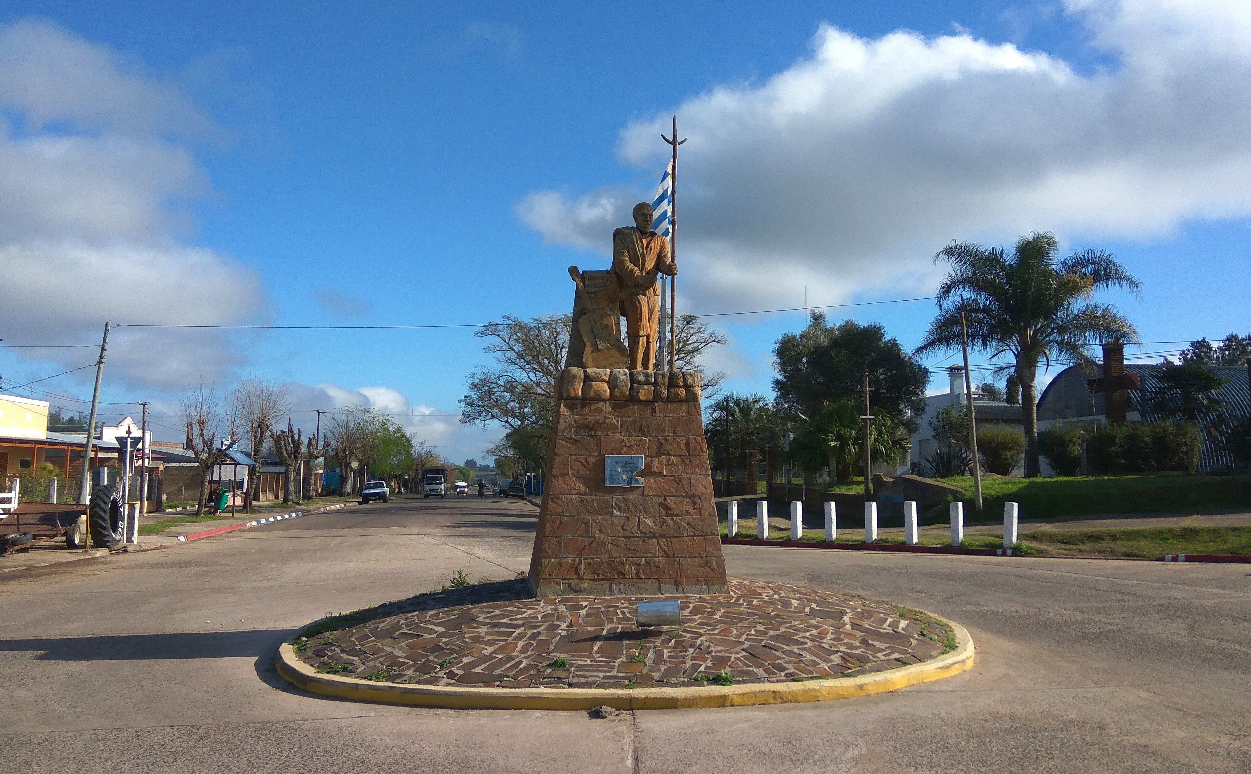 Estatua de Joaquín Lenzina, "Ansina", en la entrada de la localidad de Villa Ansina, departamento de Tacuarembó, Uruguay.